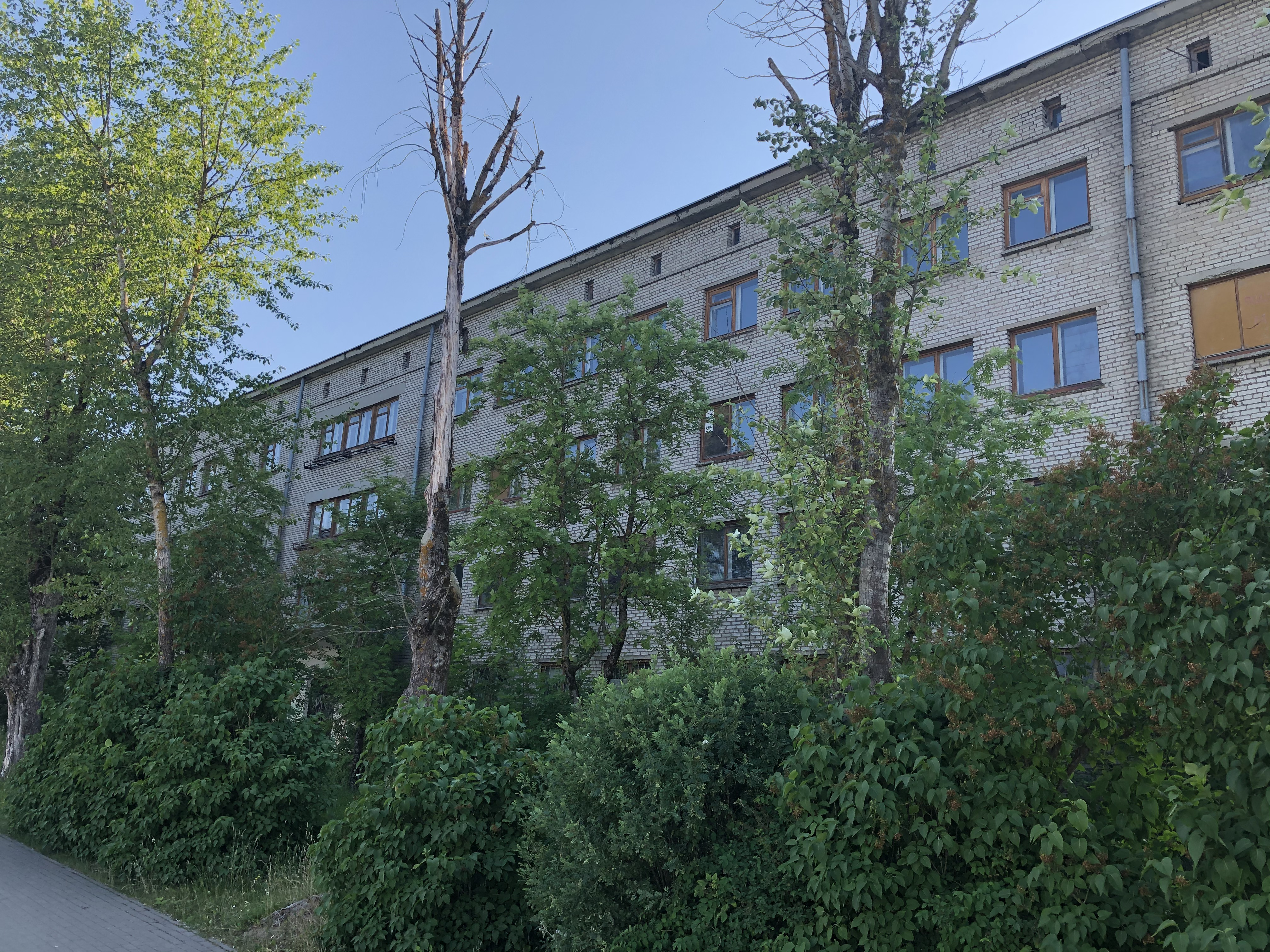 Endise Täiskasvanute kooli maja aadressil Puškini 31, Narva